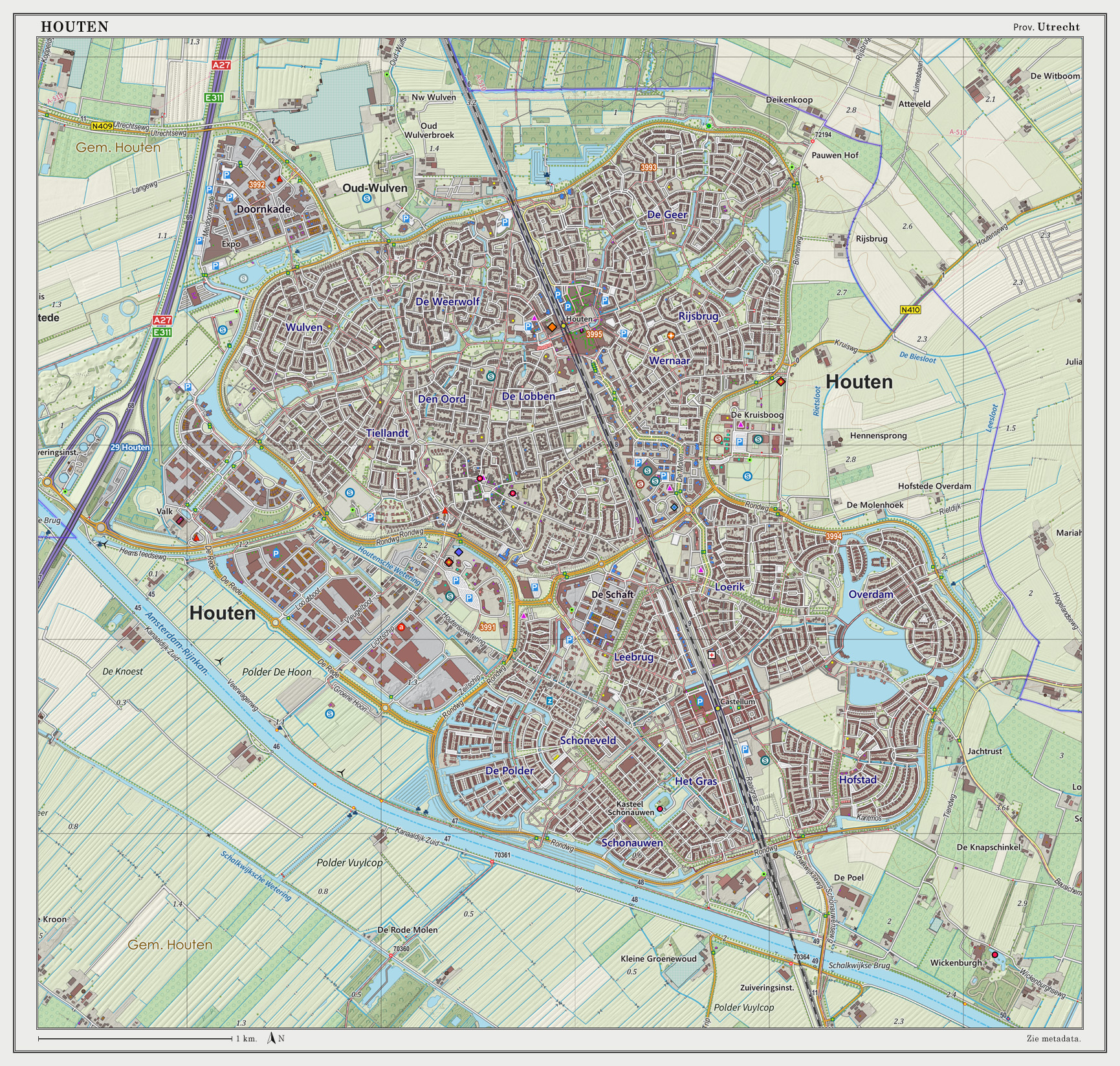 Topografische kaart van Houten (woonplaats). Resolutie: 300 pixels/km. Kaartbeeld samengesteld uit de open geodata van de Top10NL en Top25namen (Basisregistratie Topografie, Kadaster), Creative Commons BY licentie. Gebouwvlakken uit open geodata BAG extract. Wegen uit de OpenStreetMap. Reliëfschaduw uit de Actuele Hoogtekaart AHN2. Samenstelling en kleurenschema: Jan-Willem van Aalst, met QGIS2. Zie ook de Legenda.